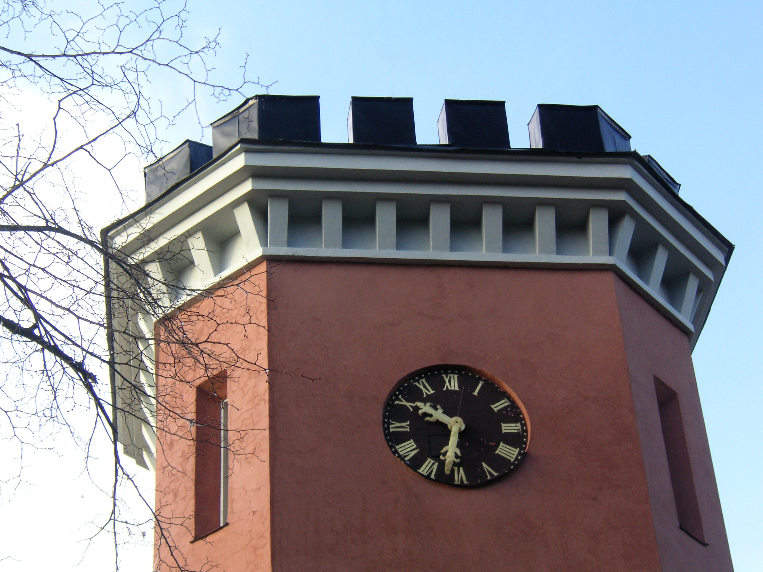 Norsborg i Huddinge kommun Sverige